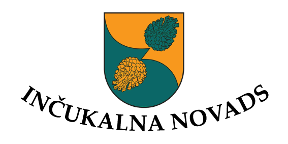 Inčukalna novada karogs